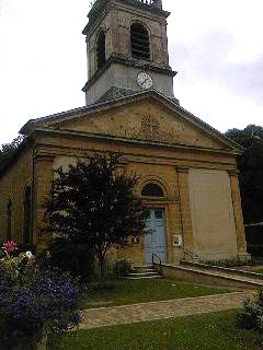 Photo de l'église du village de Givonne.